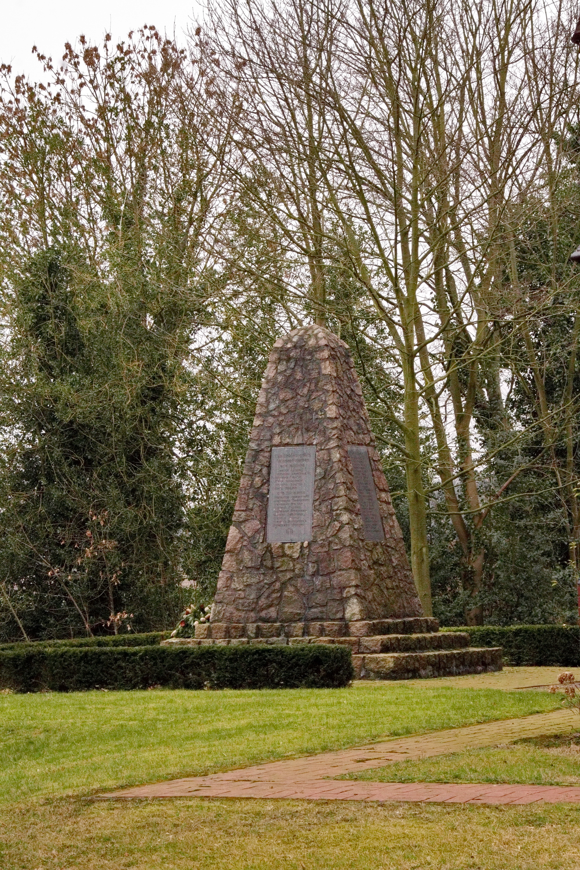 Kriegerdenkmal in Wittlohe (Kirchlinteln), Niedersachsen, Deutschland